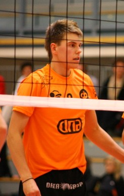 Finlnad volleyball player Kimmo Kutinlahti